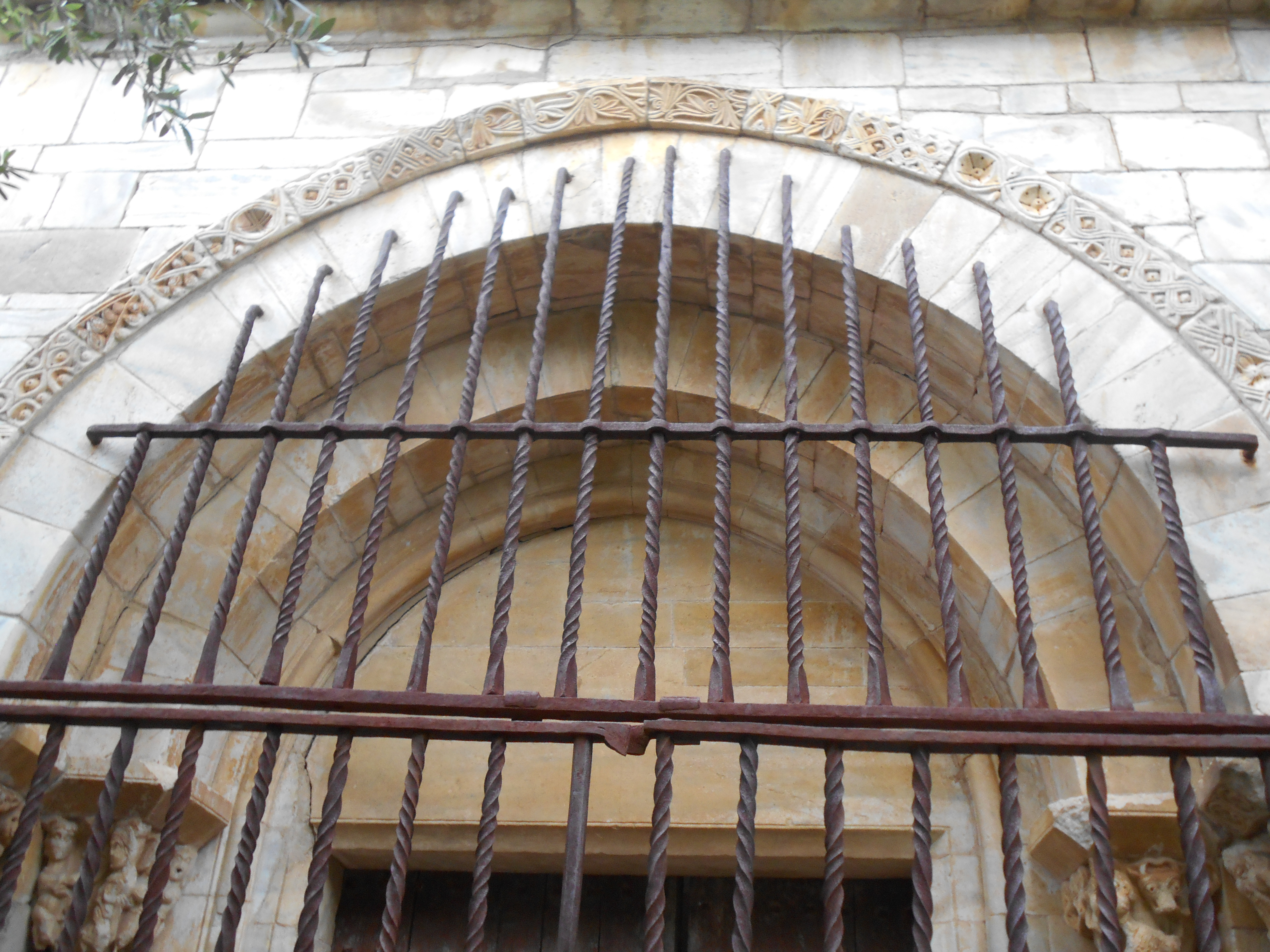 Monestir del Camp: arquivolta de la portalada romànica.